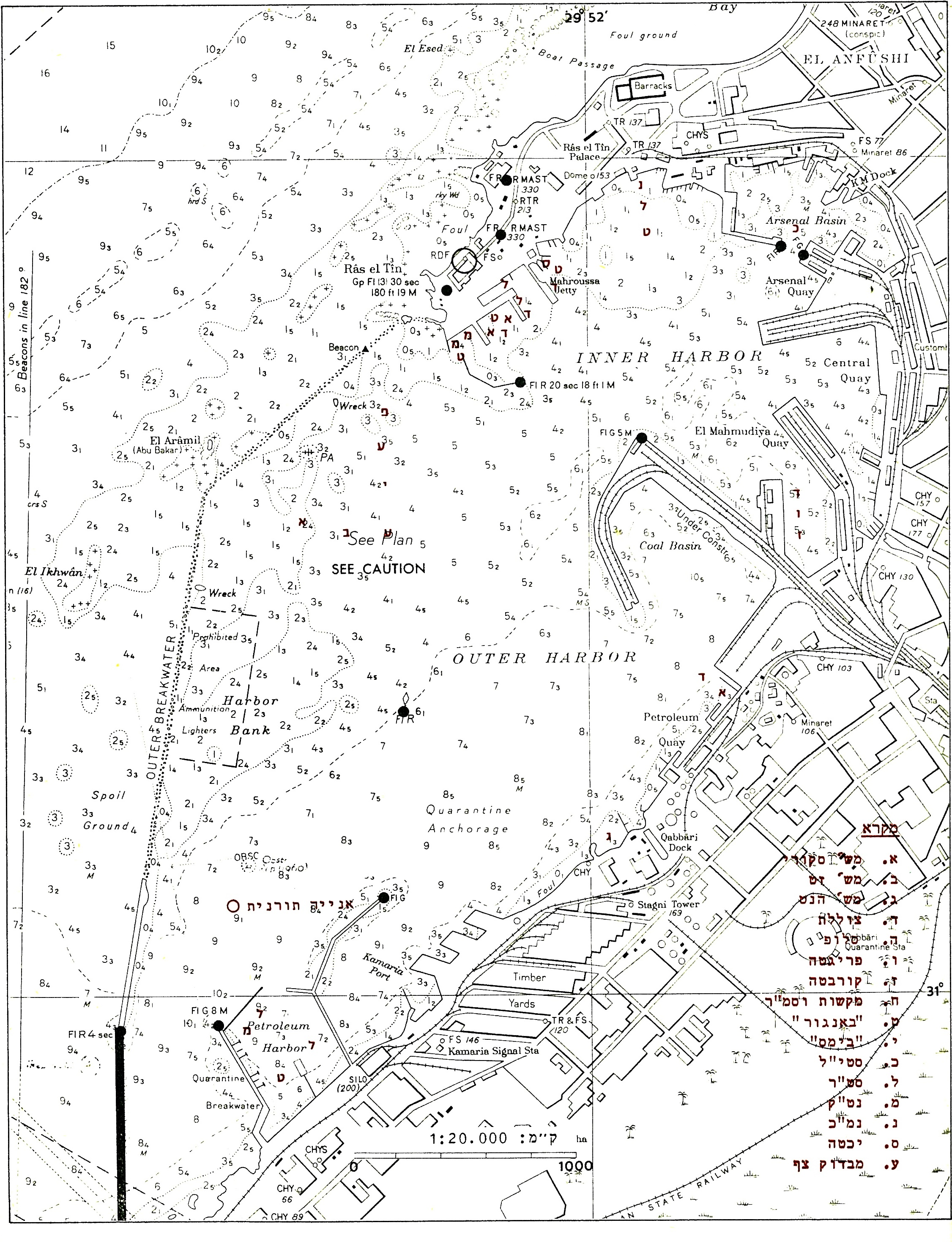 פיזור יחידות הצי המצרי בנמל אלכסנדריה במלחמת ששת הימים